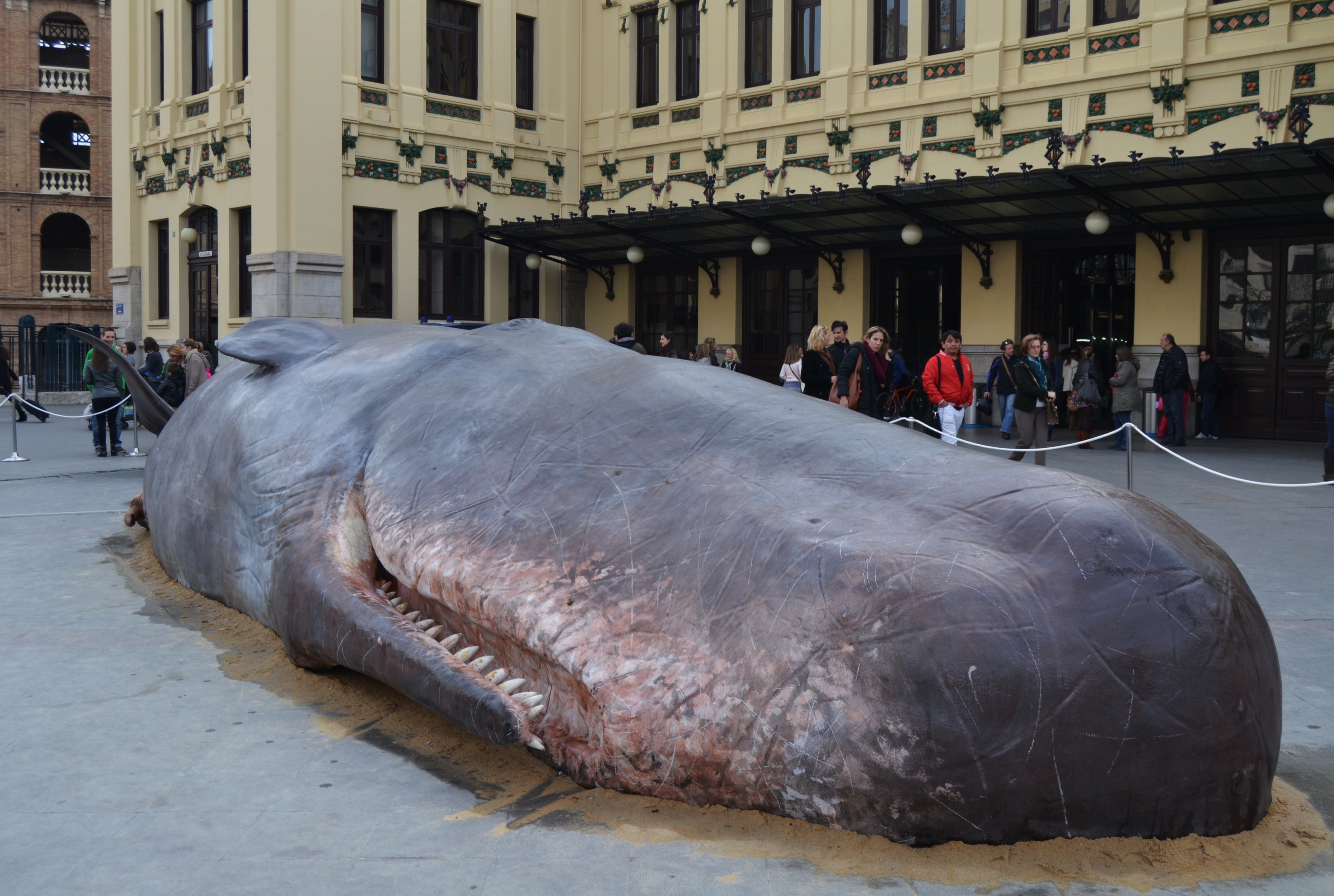 Reproducció d'un catxalot a l'estació del Nord, València